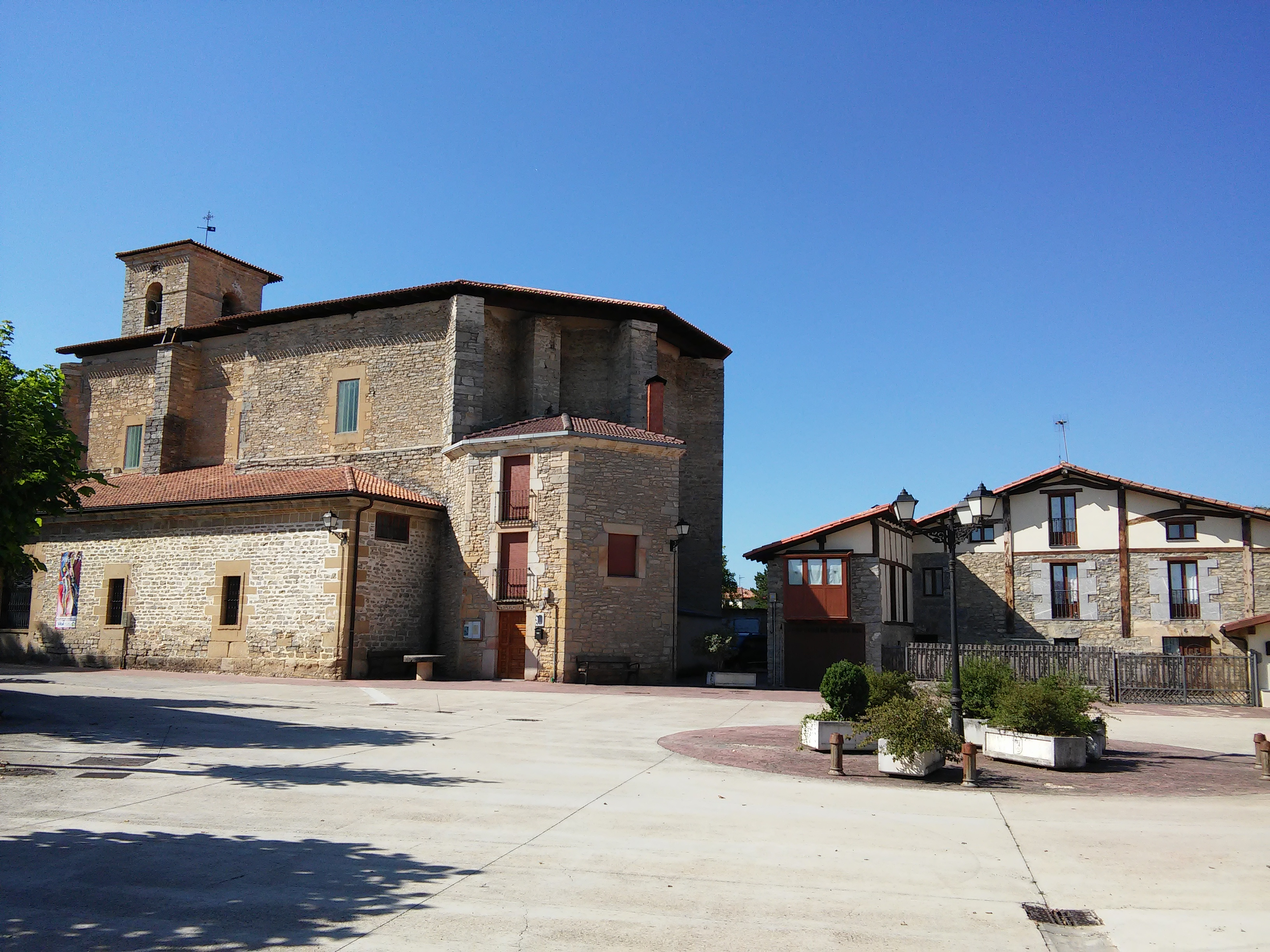 Andetxa Foronda (Gasteiz)